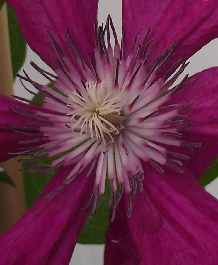 Etamines et stigmates de la clematite 'Cradinal Wysinsky'